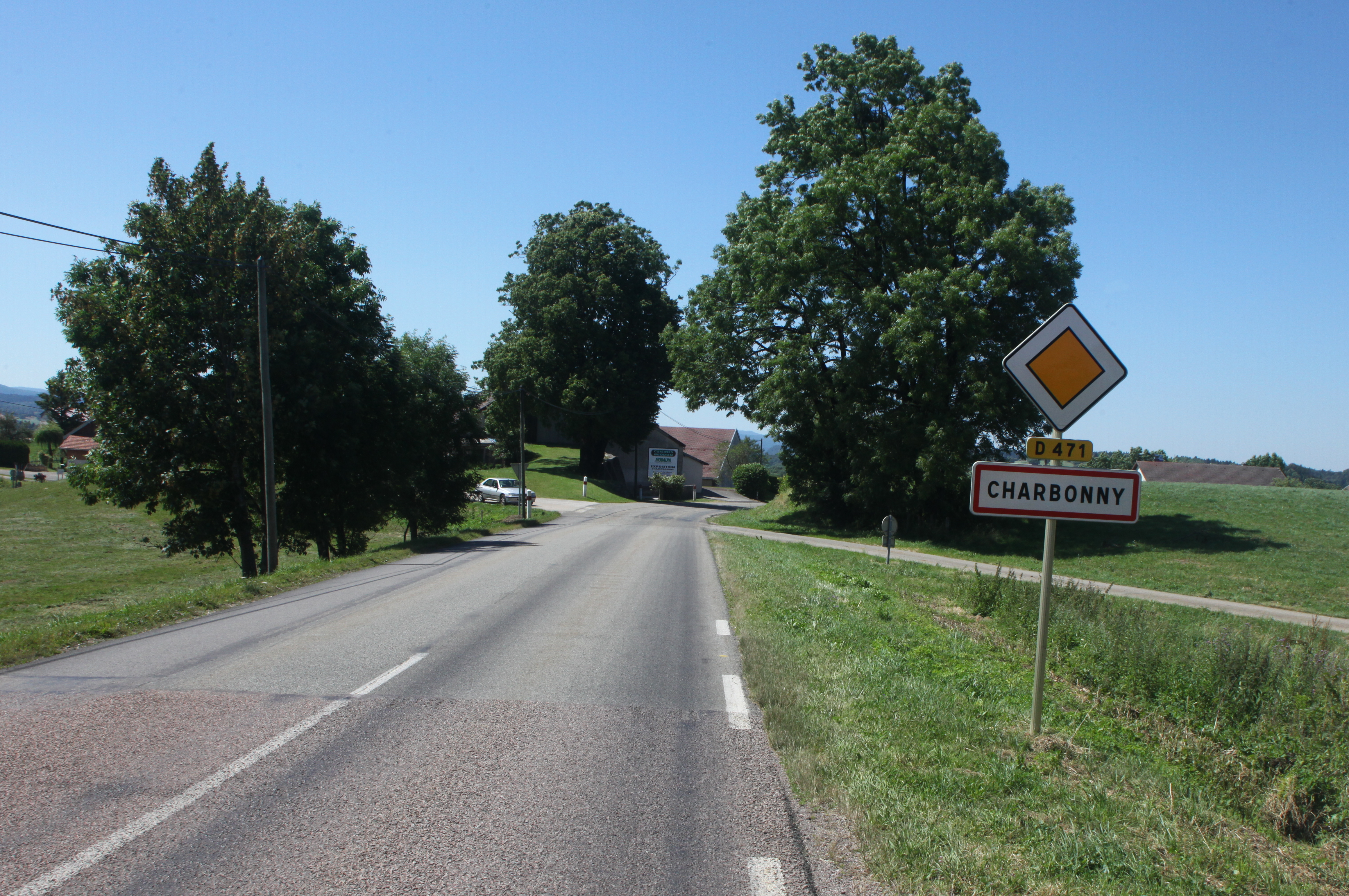 Entrée de Charbonny (Jura).